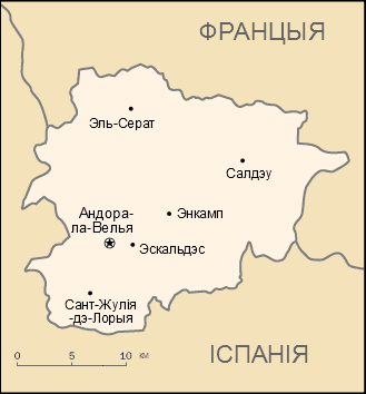 Карта Андоры